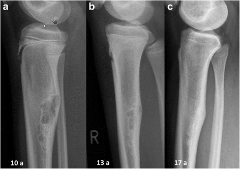 Fibroma non ossificante a livello della tibia prossimale rinvenuto in una ragazzina di 10 anni mediante radiografia e sottoposto a follow up. Col tempo la lesione tende a spostarsi distalmente. A 13 anni si osserva l'inizio di un processo di ossificazione, con comparsa di un orletto di sclerosi. Nel radiogramma eseguito a 17 anni la lesione è scomparsa, sostituita da un'area di osteosclerosi. Tratto da: Herget et al. 2016 Non-ossifying fibroma: natural history with an emphasis on a stage-related growth, fracture risk and the need for follow-up BMC Musculoskeletal Disorders CC-BY 4.0 License.